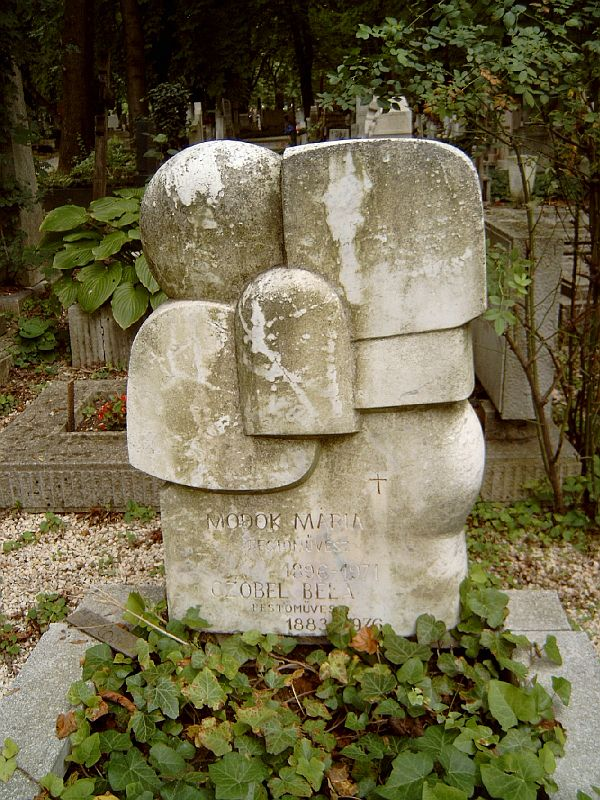 Czóbel Béla és Modok Mária (Ráckeve, 1896. szept. 27. – Bp., 1971. márc. 20.) festő sírja Budapesten. Farkasréti temető: 1/4-1-39/40. Alkotója Farkas Aladár (szobrász) (1909-1981)